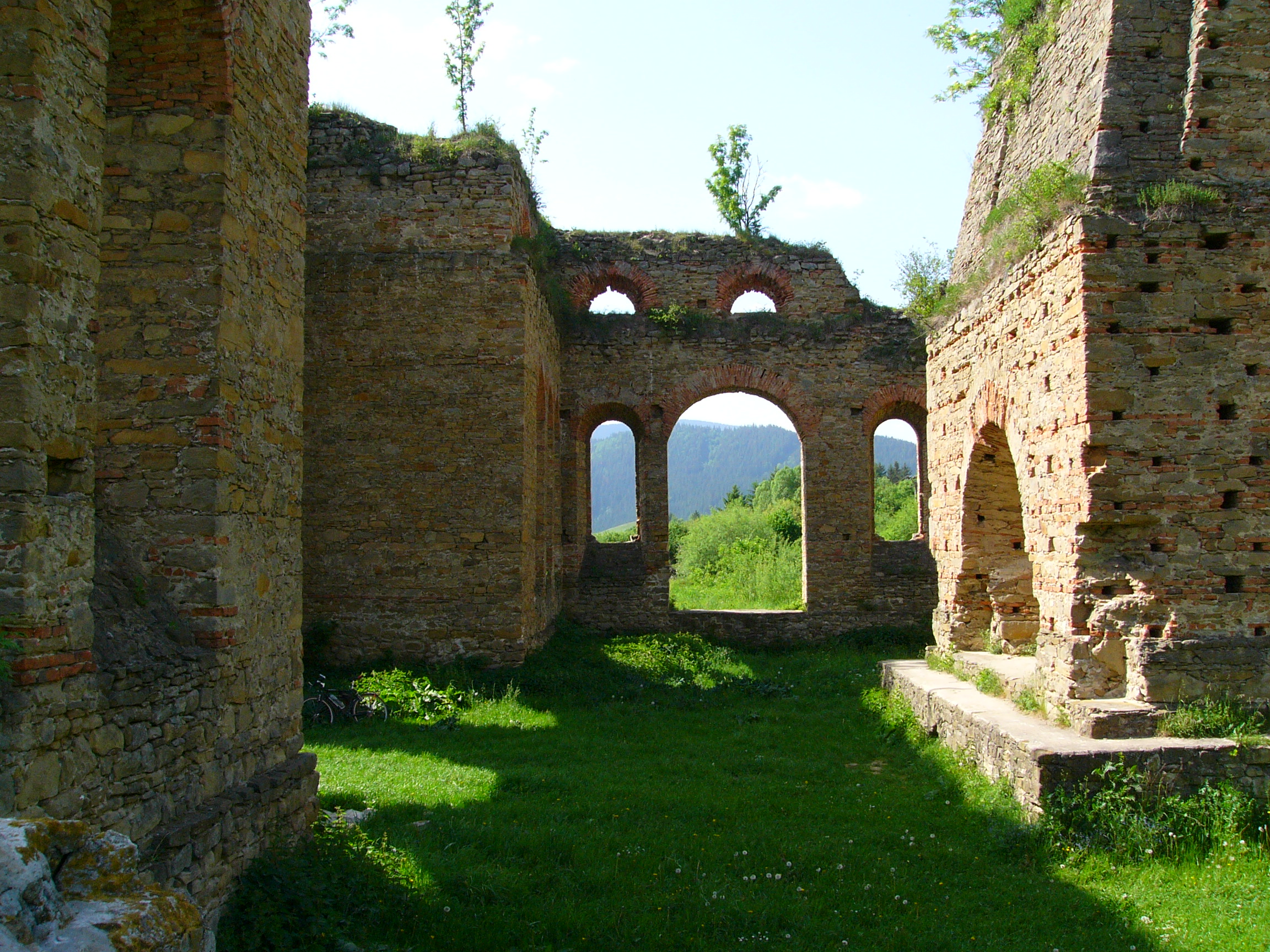 Františkova huta This medium shows the protected monument with the number 510-295/0 in the Slovak Republic.